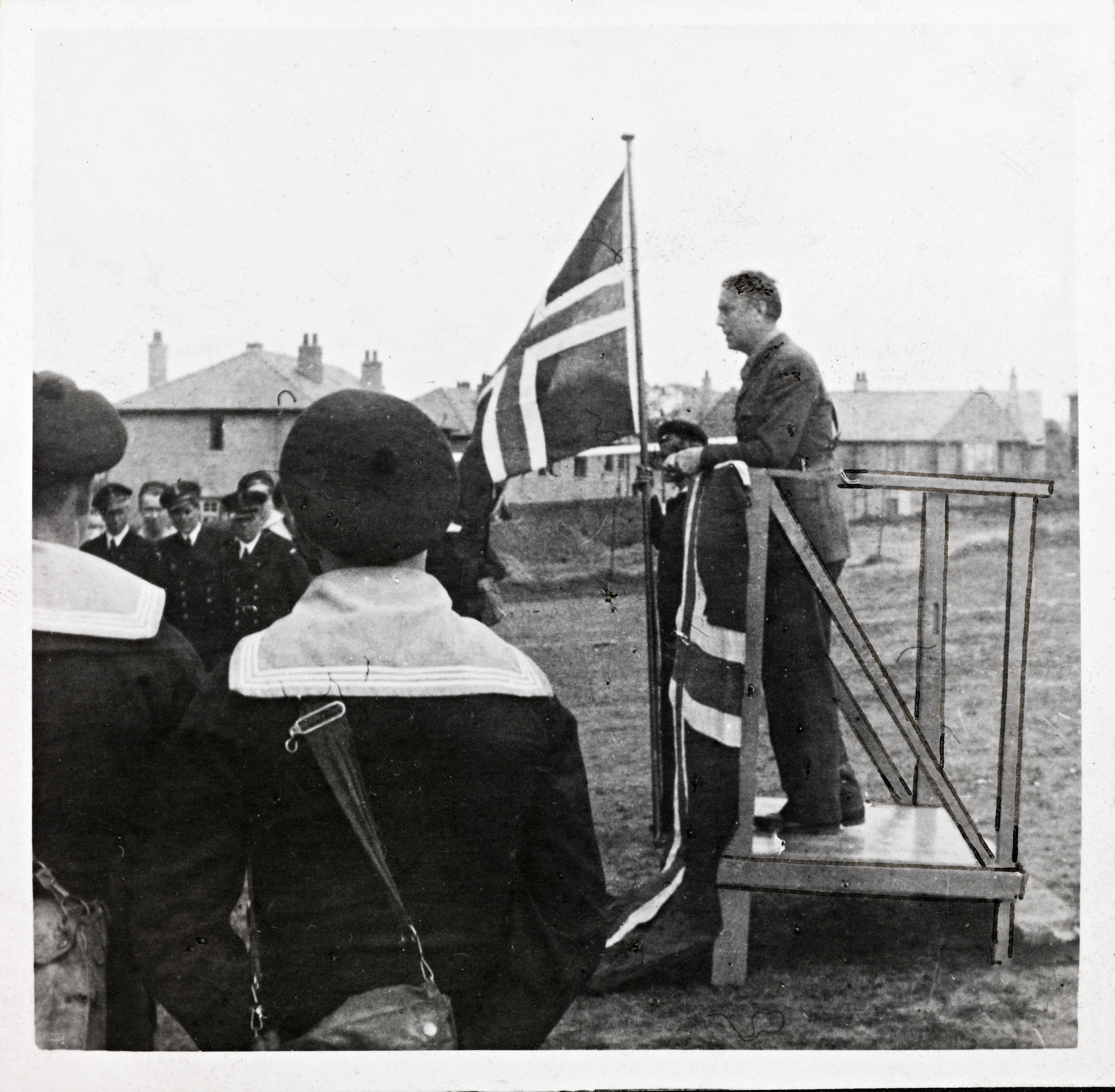 Beskrivelse / Description: "Jeg er takknemlig over å få være i dag blant dere, blant seilende, flygende, kjempende sjøfolk..." Nordahl Grieg var forfatter. Han var også utdannet offiser og deltok som krigskorrespondent i flytokter over Atlanterhavet og Nordsjøen. Han ble drept da flyet han satt i ble skutt ned over Berlin 2. desember 1943 (kilde: snl.no). Dato / Date: 17. mai 1942 Sted / Place: England Fotograf / Photographer: ukjent / unknown Digital kopi av original / Digital copy of original: s/h papirpositiv Eier / Owner Institution: Nasjonalbiblioteket / National Library of Norway Lenke / Link: Bildesignatur / Image Number: blds_05988